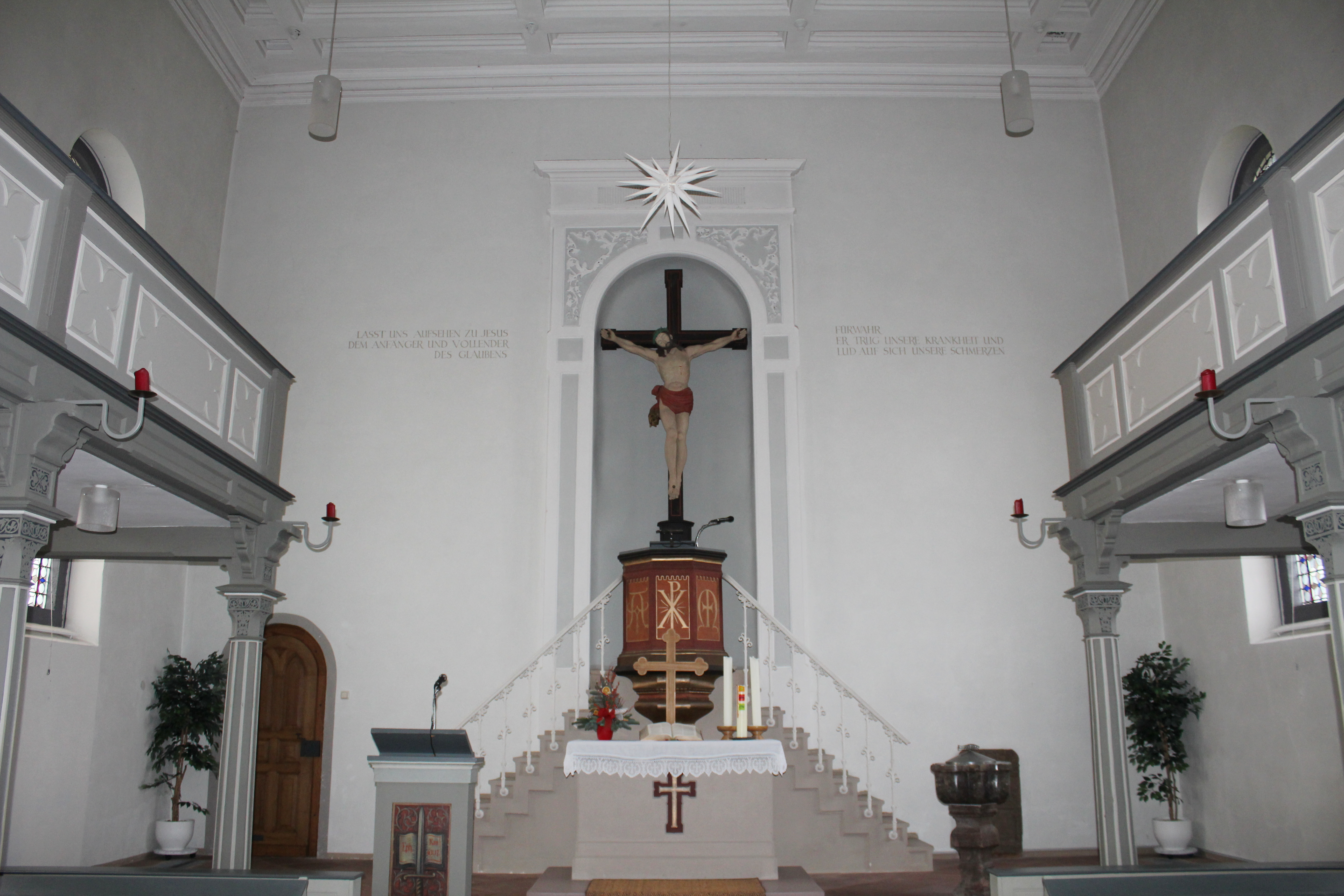 Evangelische Kirche Merlau, Gemeinde Mücke, Vogelsbergkreis, Hessen, Deutschland